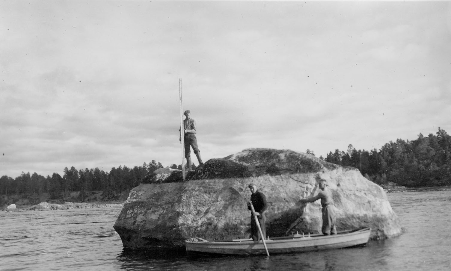 Båt. Båttrekk. Nivelleringsarbeider. Flomsteiner. Vassdragsarkivet. Dato: xx.xx.1939